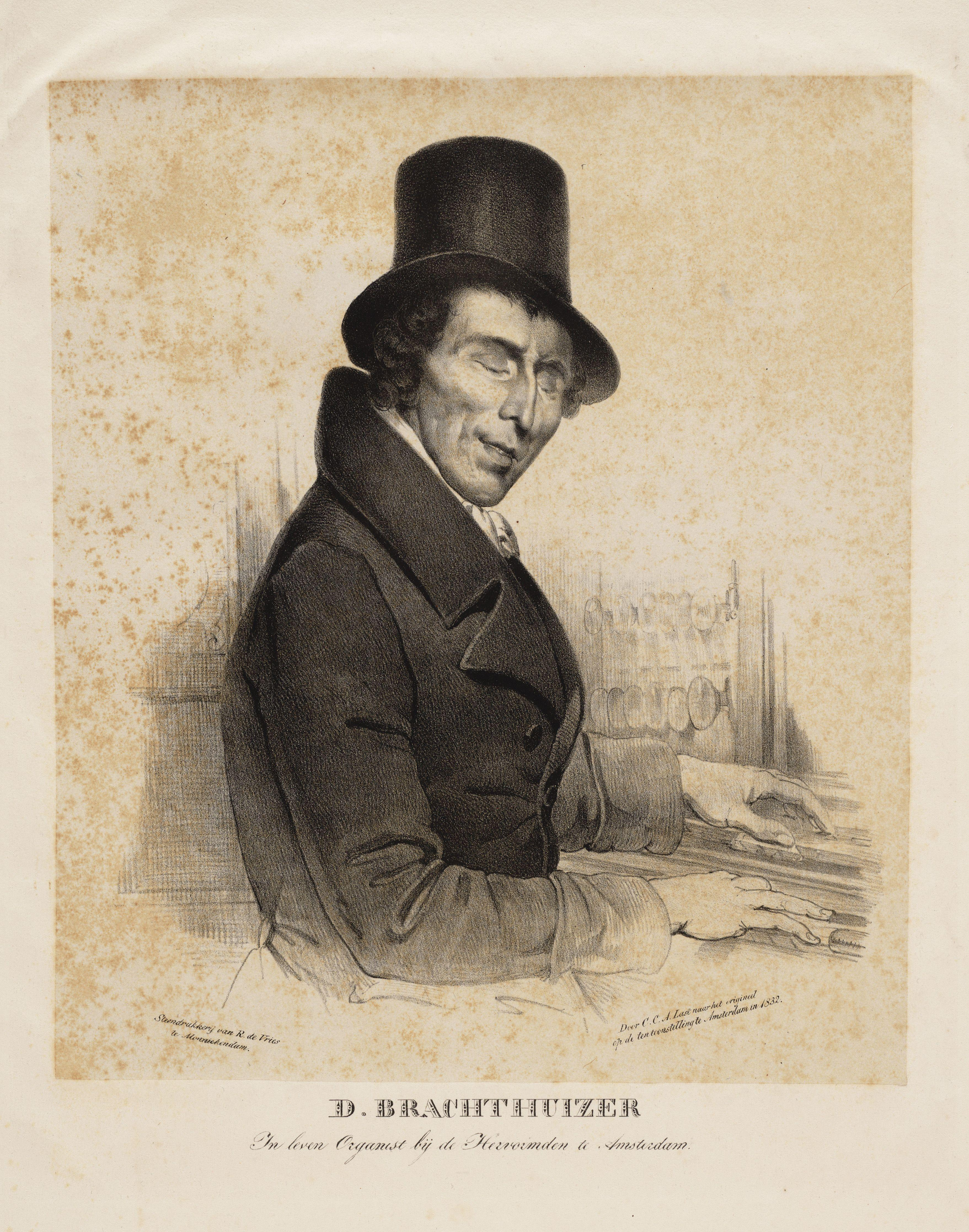 Beschrijving Daniel Brachthuizer (28-09-1779 / 20-06-1832) Organist van de Nieuwe Kerk. Afmetingen: 309 x 263 mm. Documenttype prent Vervaardiger Last, Carel Christiaan Antony Vries, R. de Collectie Collectie Stadsarchief Amsterdam: tekeningen en prenten Datering 1832 Inventarissen Afbeeldingsbestand 010097014280